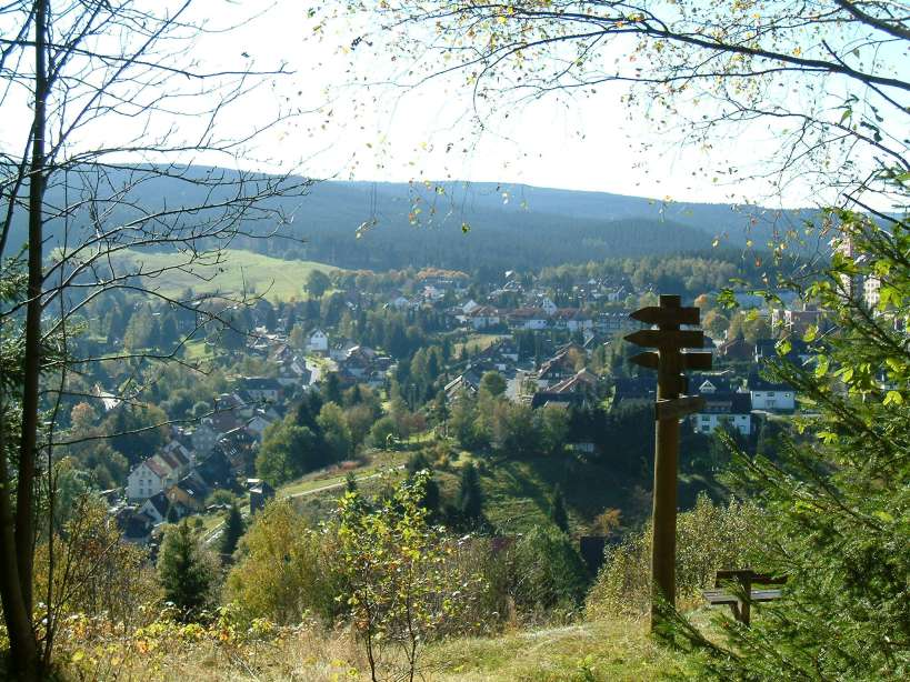 Altenau, aufgenommem im Herbst 2004 mit Blick vom alten Turnplatz. Bild steht jeder Verwendung zur freien Verfügung! Gez. H. Hoffmeister